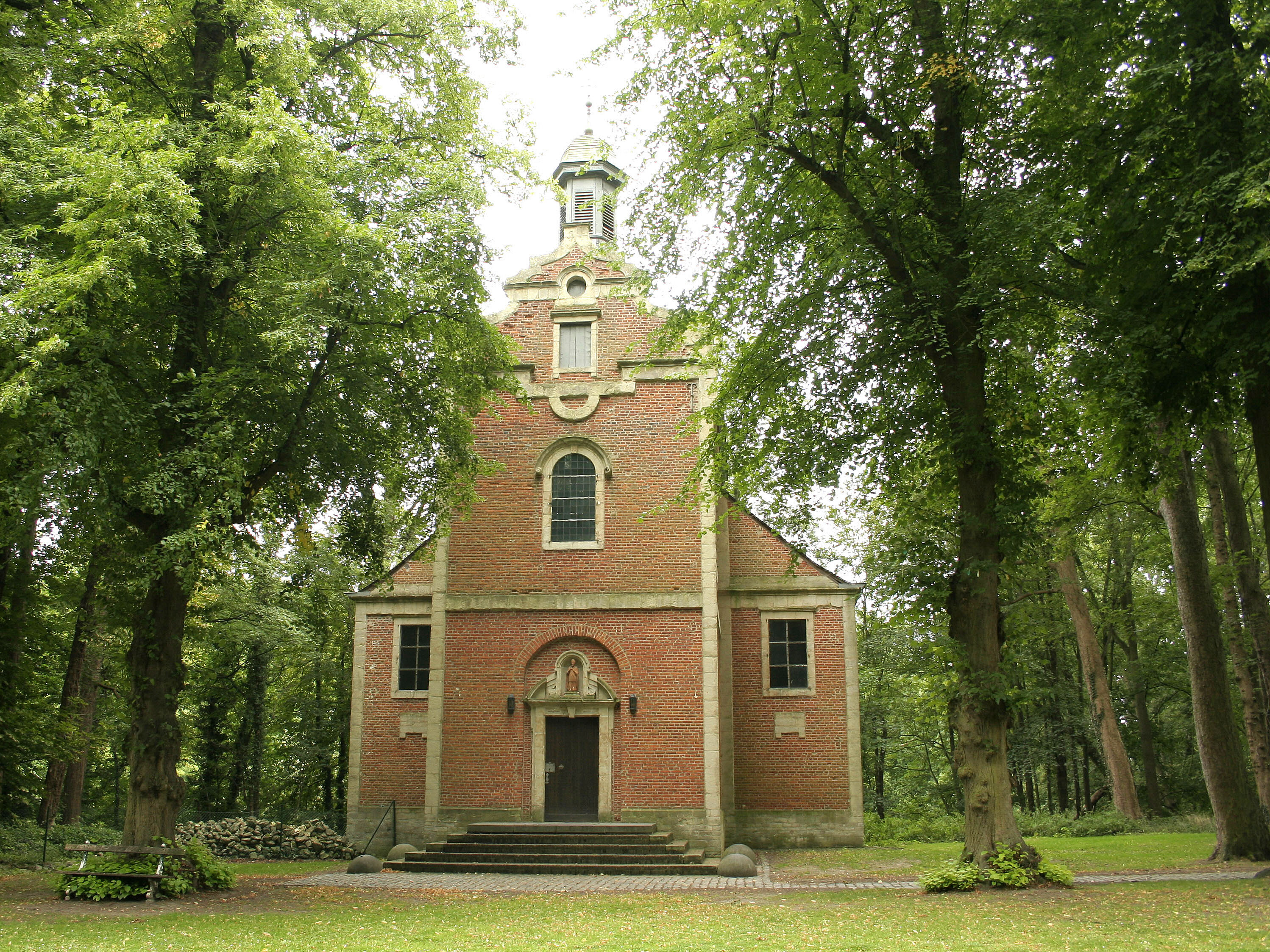 Tervueren, la chapelle Saint-Hubert (XVIIIe siècle).